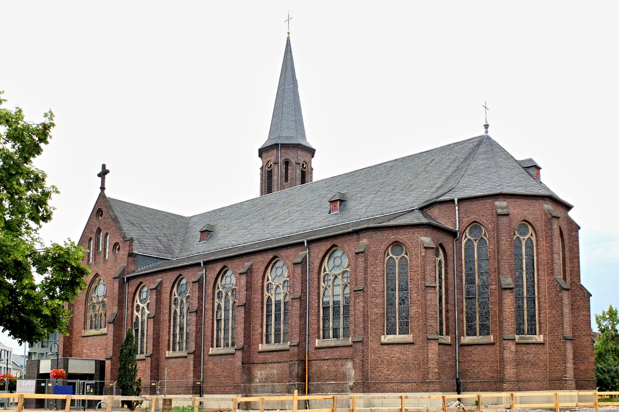 Blick von Südosten auf die St. Jacobus Kirche, Hilden